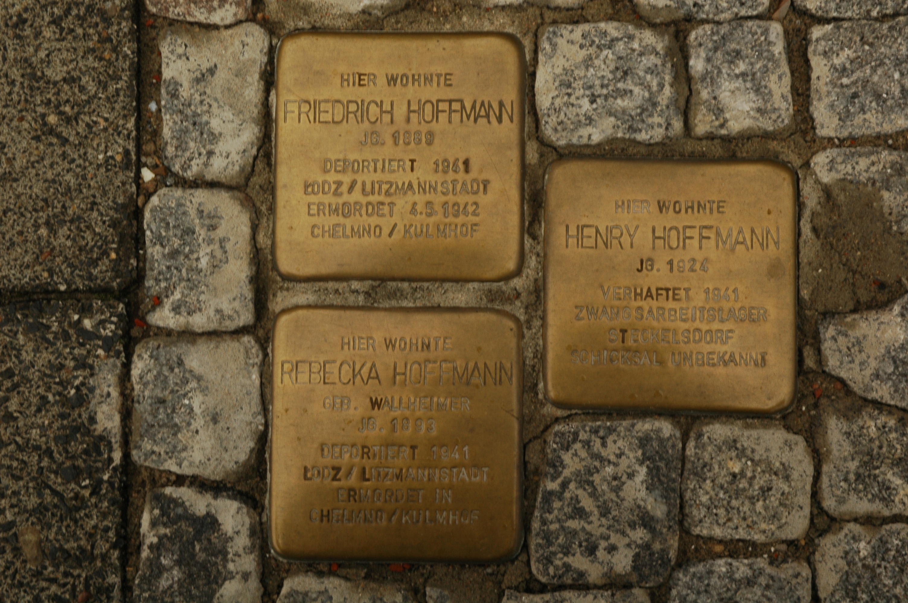 Stolpersteine der Familie Hoffmann in Norderney, Bismarckstraße 4